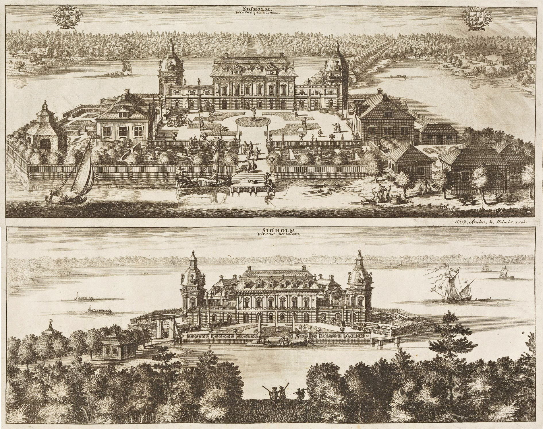 Siöholm versus Septentrionem ; Siöholm versus Meridiem